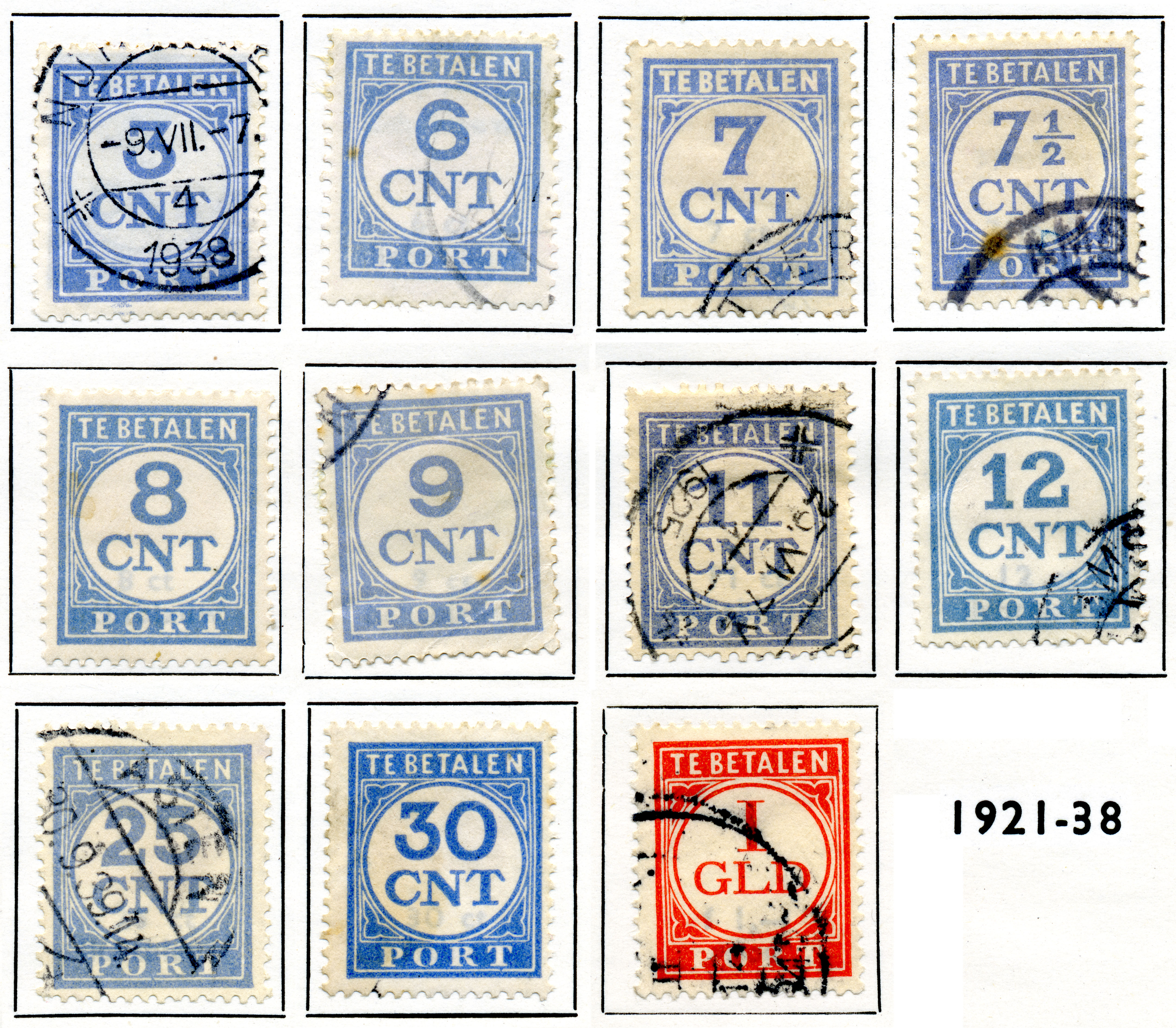 1921-1938 Portzegels Nederland